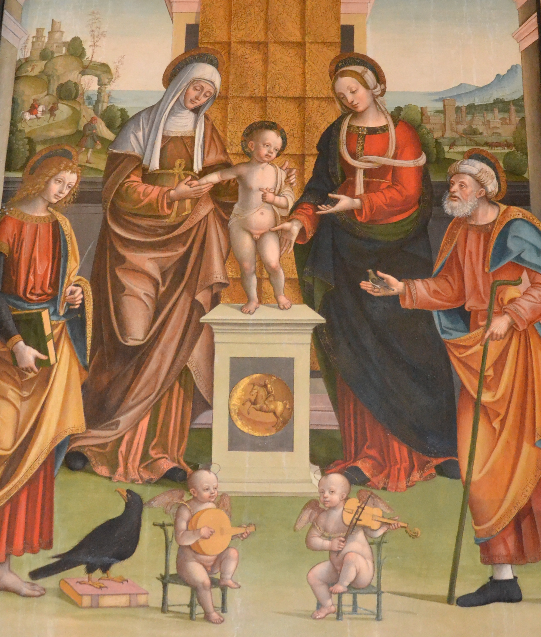 Bernardino Lanzani, Chiesa di Santa Maria del Carmine (Pavia) L’ opera è firmata da Bernardino Lanzani di San Colombano, ed è datata 4 agosto 1515. Gesù bambino è in piedi su un plinto classico, sul quale è rappresentato un medaglione in bronzo con un monumento equestre che sembra alludere al Regisole. Ai lati si dispongono Sant’Anna e la Vergine, Giovanni evangelista e Gioacchino; in primo piano due piccoli angeli musicanti. Nella parte inferiore i due riquadri raccontano L’incontro di Gioacchino con Anna e la nascita della Vergine. I piccoli tondi laterali contengono i ritratti di due carmelitani: Sant’Angelo martire e sant’Alberto di Sicilia.